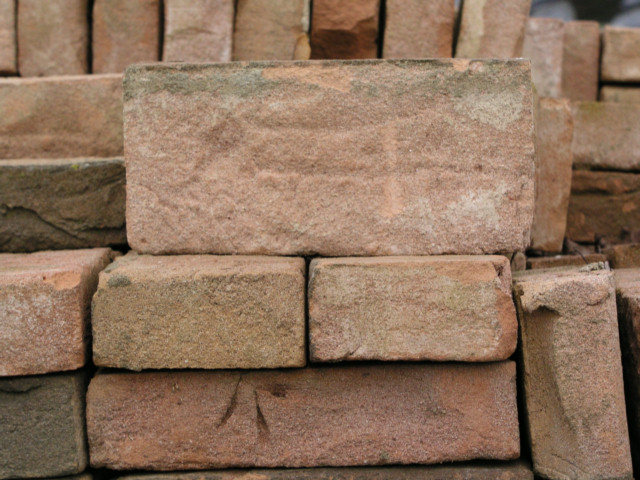 pseudo?handvormstenen